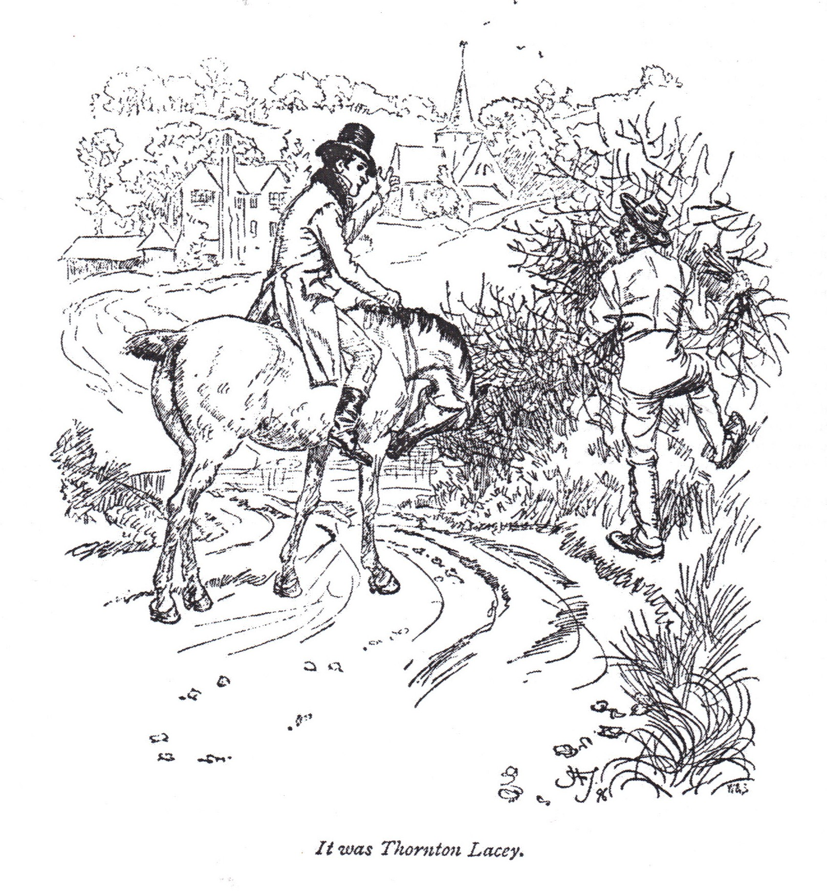 Mansfield Park, ch 25 : Henry Crawford vient visiter Thornton Lacey, la future paroisse d'Edmund Bertram